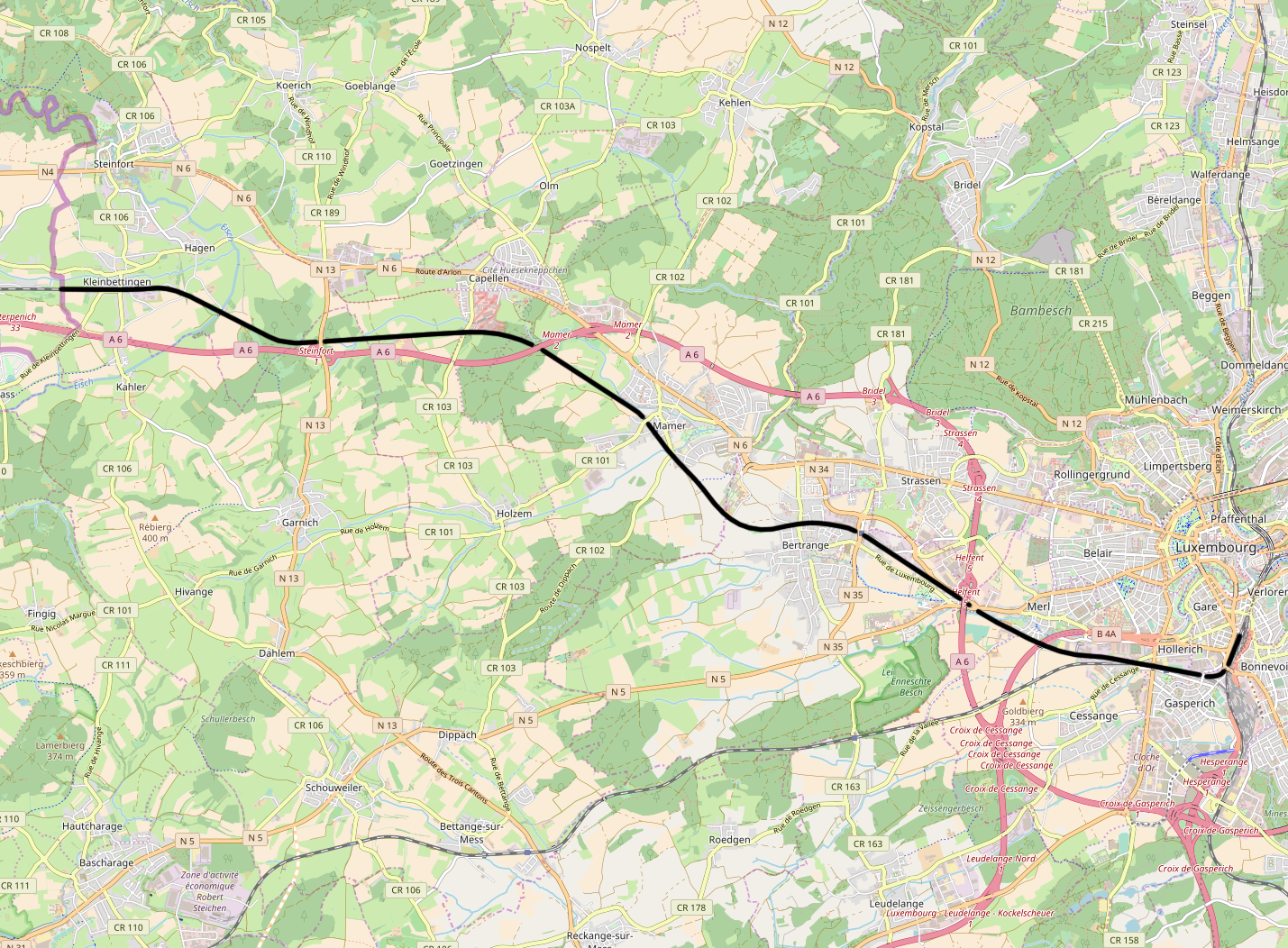 CFL line 5, Luxembourg - Kleinbettingen